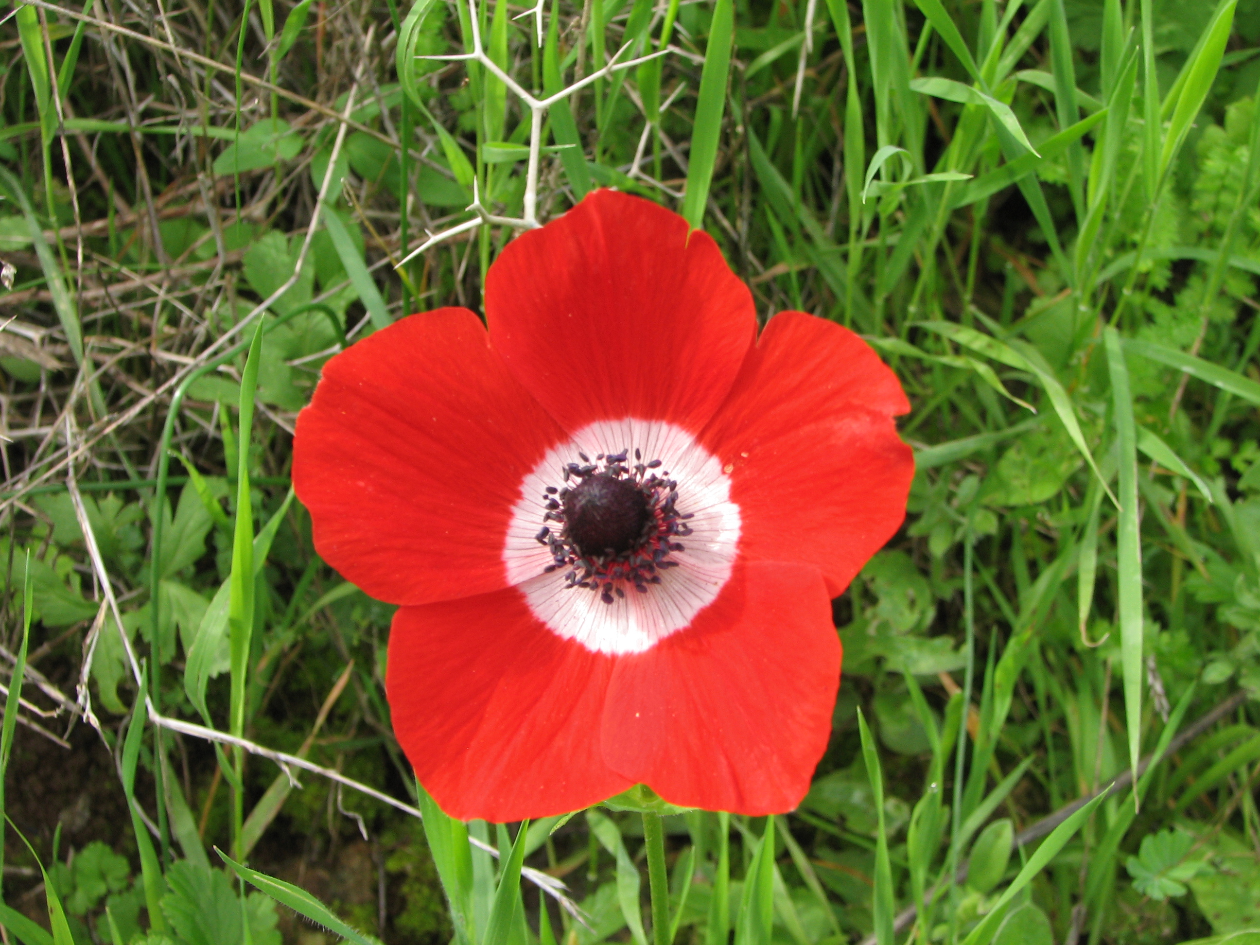 Green Paths, between Nesher - Yagur on Mount Carmel Israel. View from the path השביל הירוק בין העיר נשר וקיבוץ יגור, על הצלע הצפונית של הר הכרמל. מראות על השביל כלנית מצויה